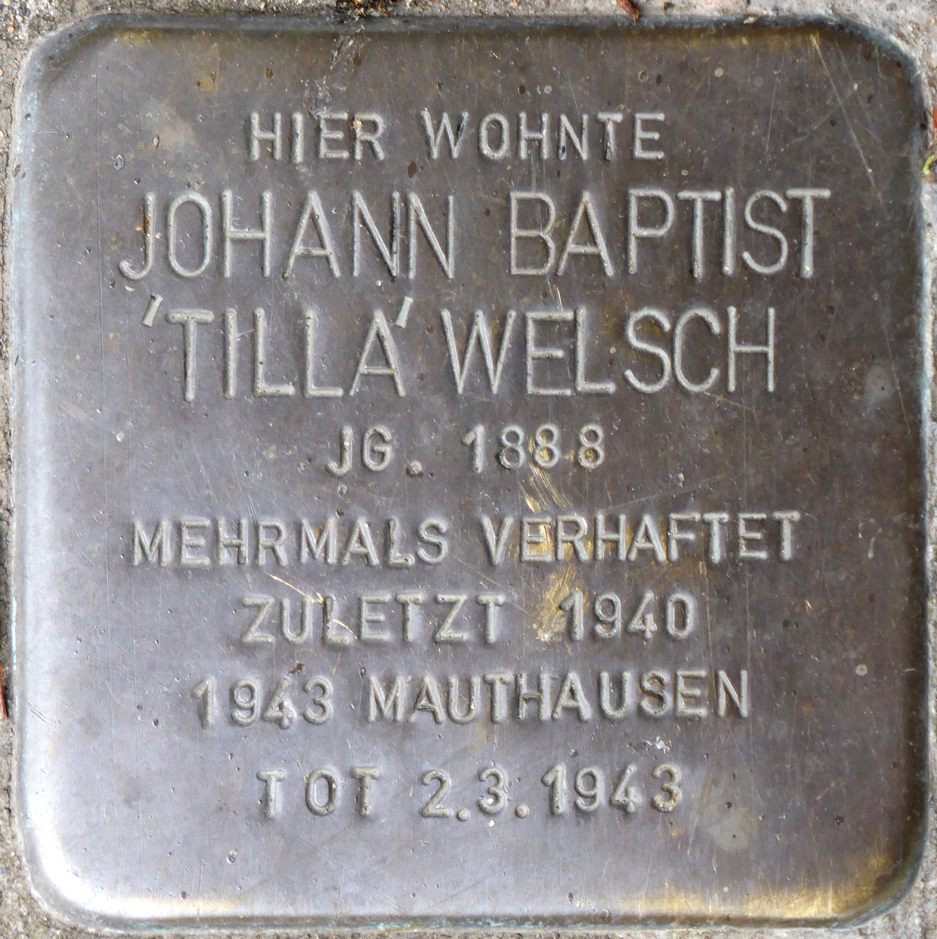 Stolperstein: Johann Baptist 'Tilla' Welsch (Schnurgasse 64) - Verlegestelle Schnurgasse Ecke Steinstraße, Köln.